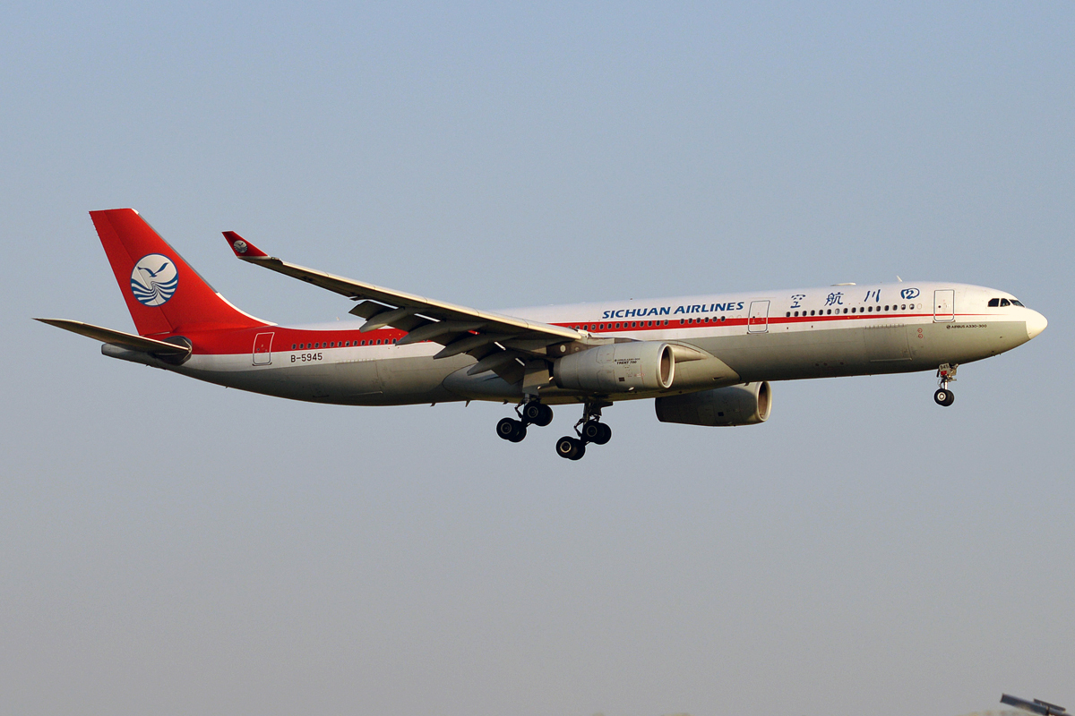 Sichuan Airlines, B-5945, Airbus A330-343